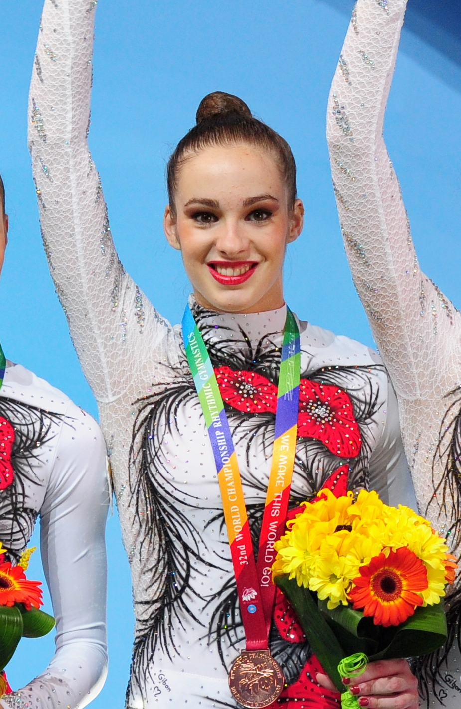 Elena López con la medalla de bronce en el podio de la final de 3 pelotas y 2 cintas en el Campeonato Mundial de Kiev en 2013.